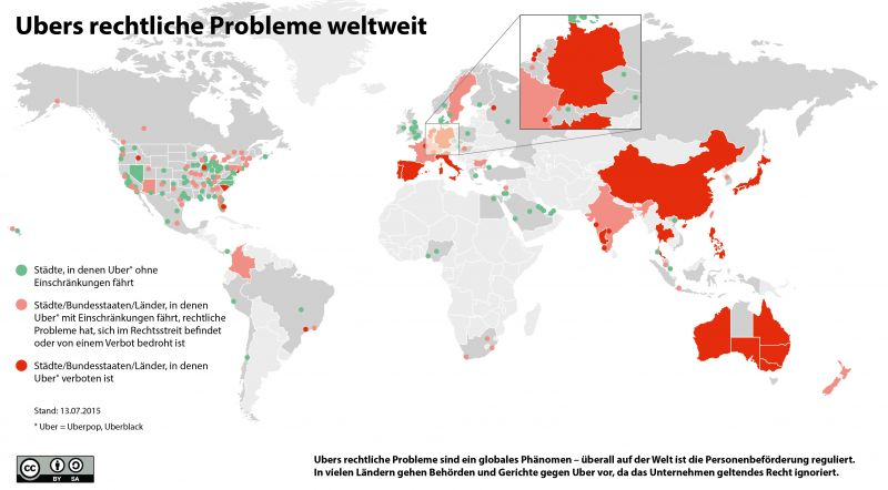 Infografik der rechtlichen Probleme von Uber